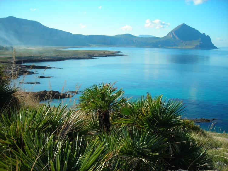 Golfo di Macari_S.Vito lo Capo e a destra monte Cofano, Trapani (Sicily)